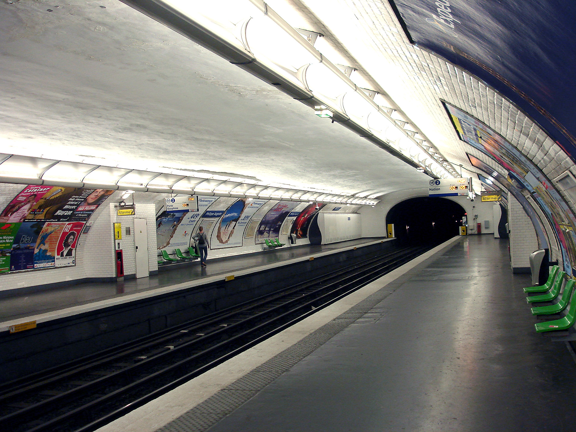 La station Philippe Auguste de la ligne 2 du métro de Paris, France